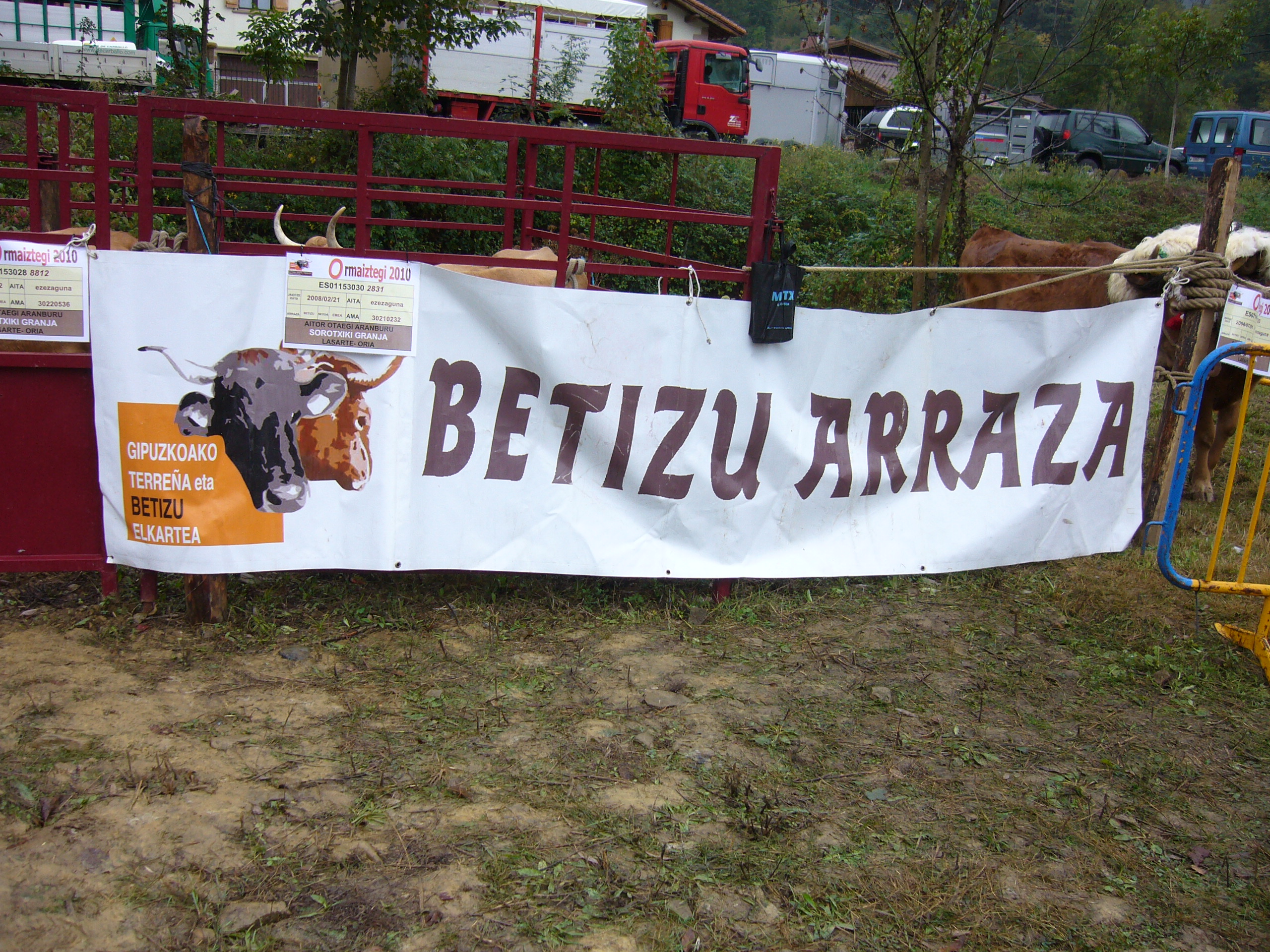 Betizuak aurkezten dituen pankarta Ormaiztegiko bertako arrazen azokan 2010.en urtean